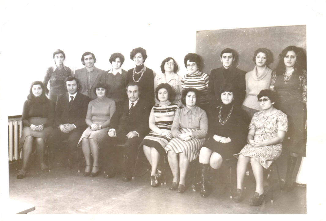 Գաբրիել Խաչատրյան